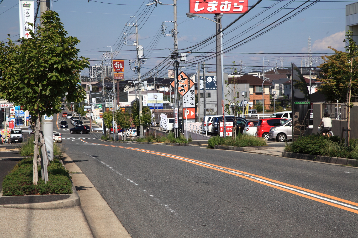 桶狭間清水山付近（名古屋市緑区、2012年）